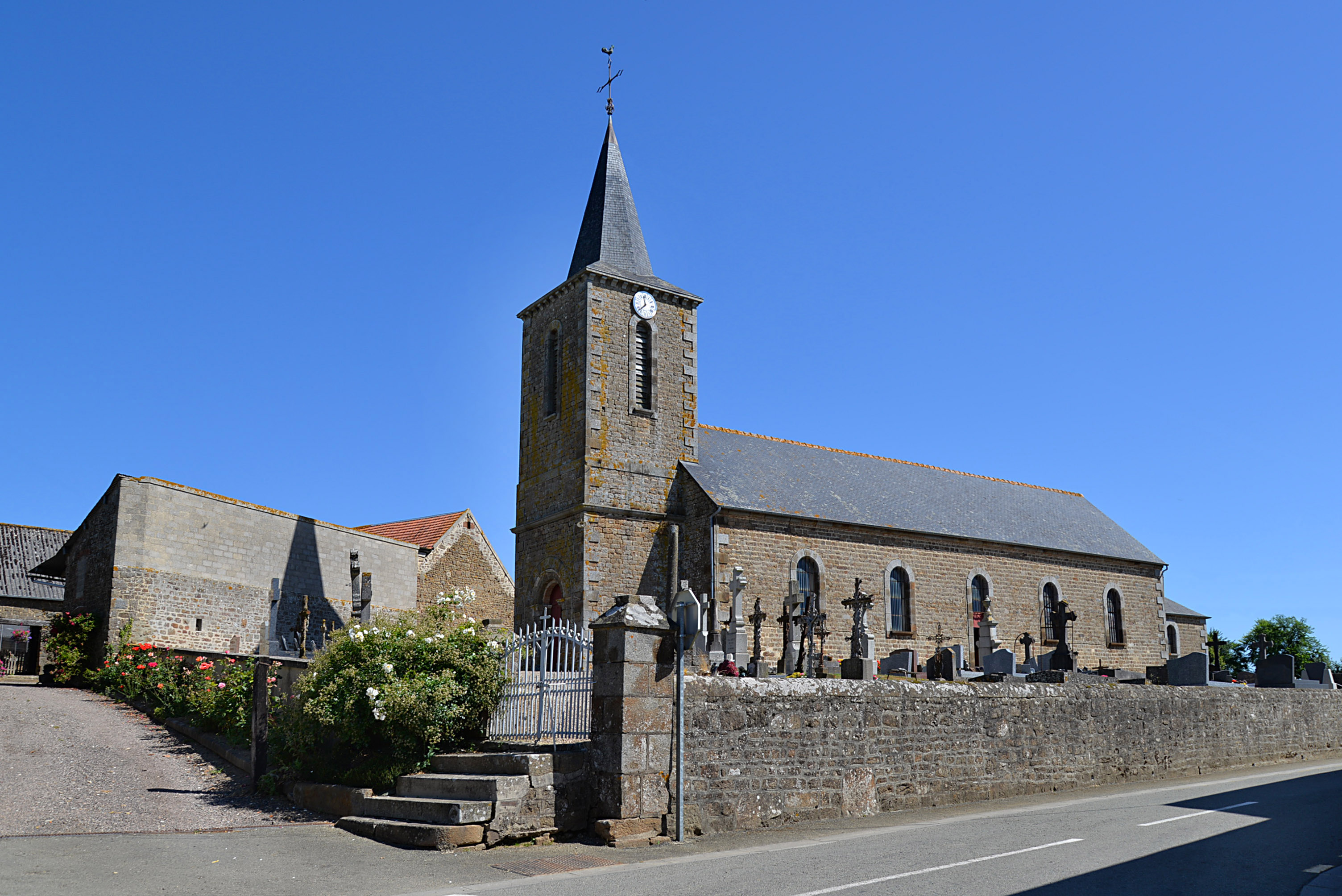 Montreuil-au-Houlme (Orne)